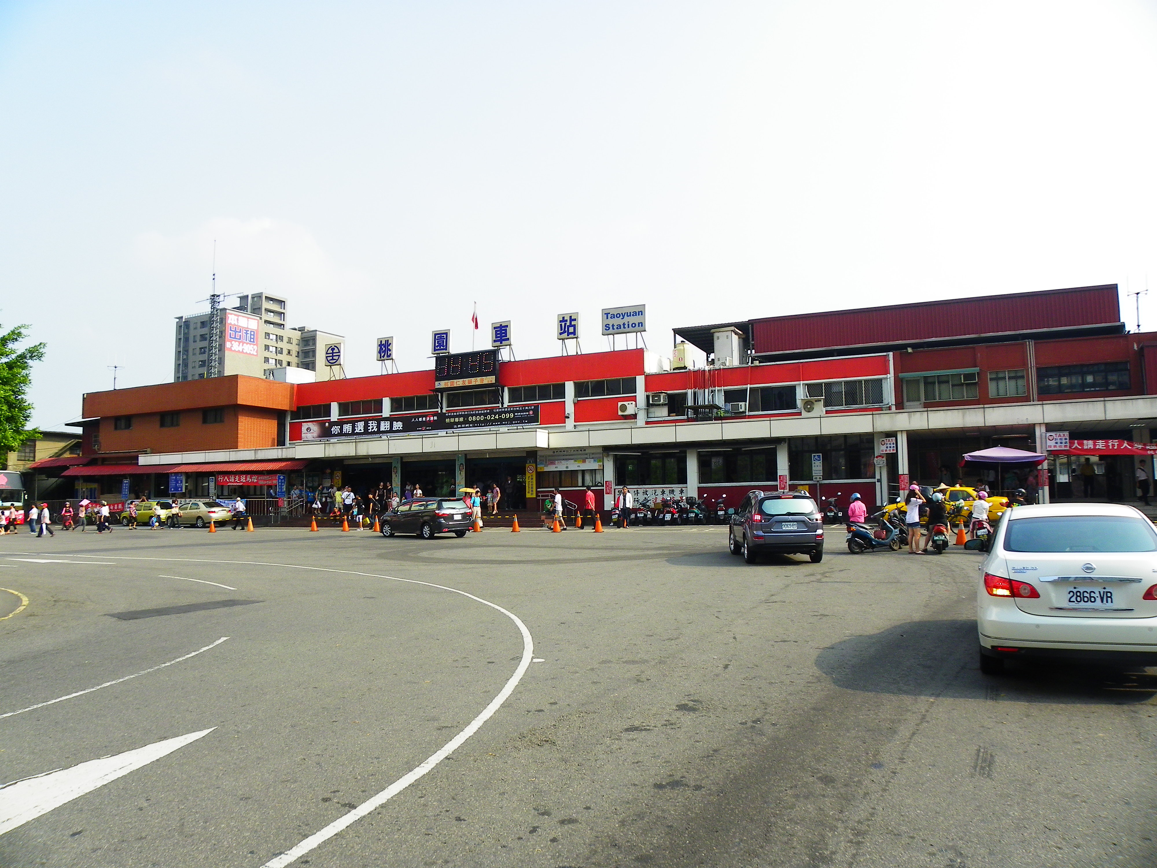 中文（台灣）: 臺鐵縱貫鐵路桃園車站。